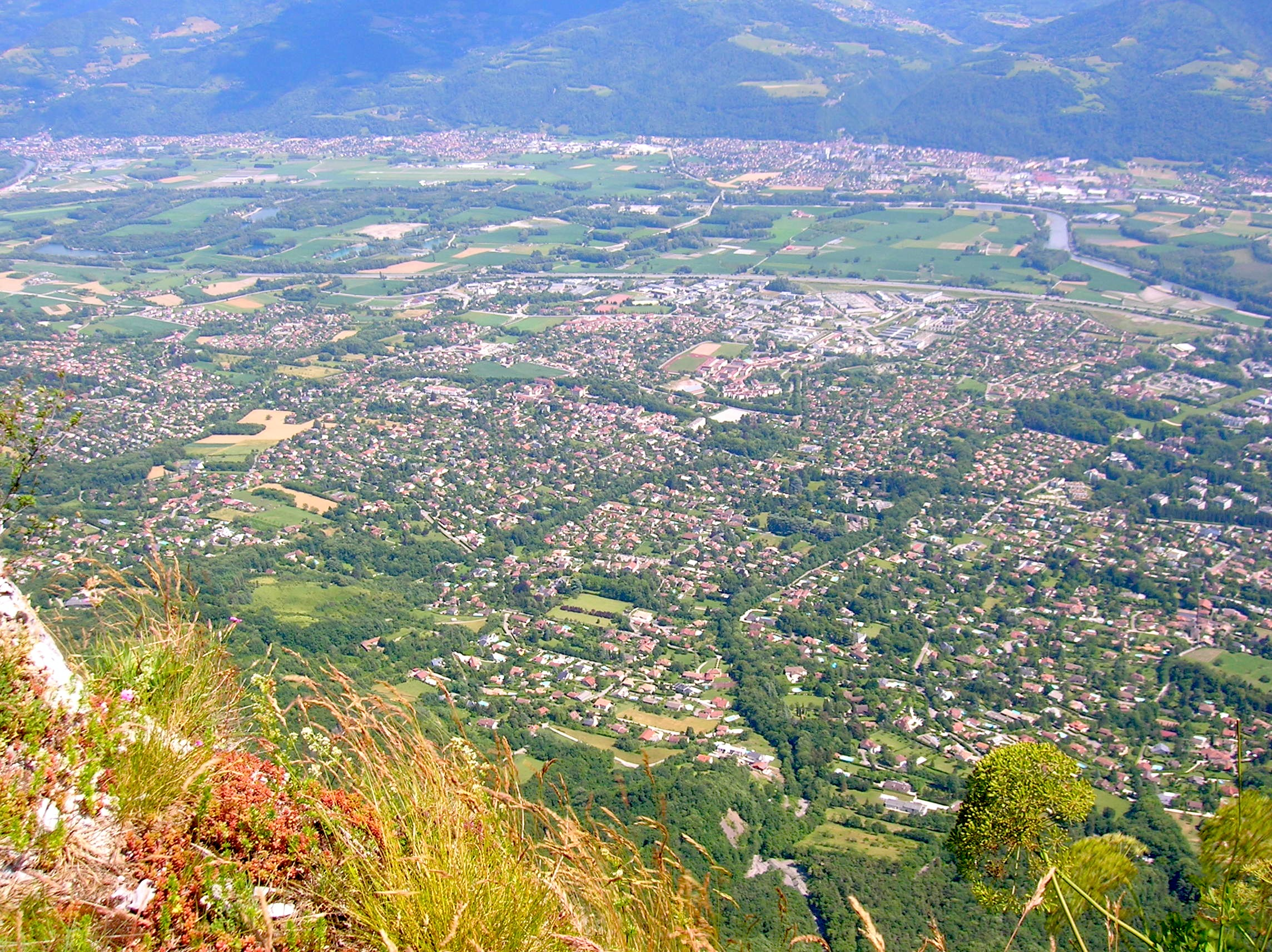 Vue générale de l'agglomeration grenoblois depuis le Fort St Eynard, Le Sappey-en-Chartreuse, Isère, France. La Combe de Lancey, Villard-Bonnot, Le Versoud, Saint-Jean-le-Vieux, Domène, Revel, Meylan, Montbonnot-Saint-Martin, Biviers, bords de Saint-Ismier. (voir notes)